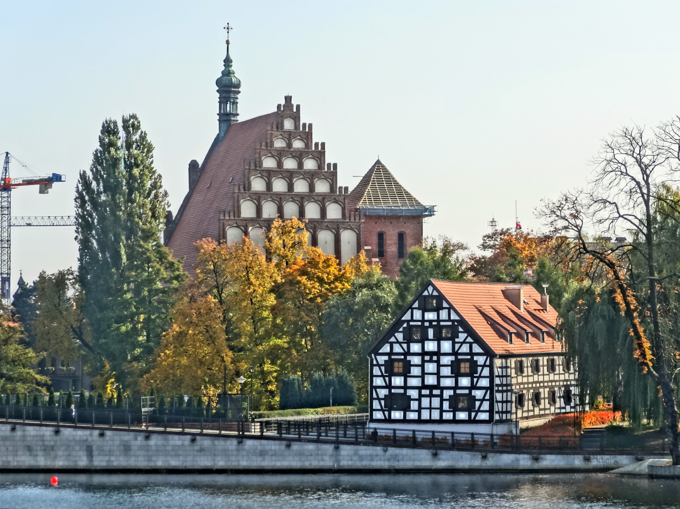 Katedra bydgoska i Biały Spichlerz - widok z Wyspy Młyńskiej w Bydgoszczy